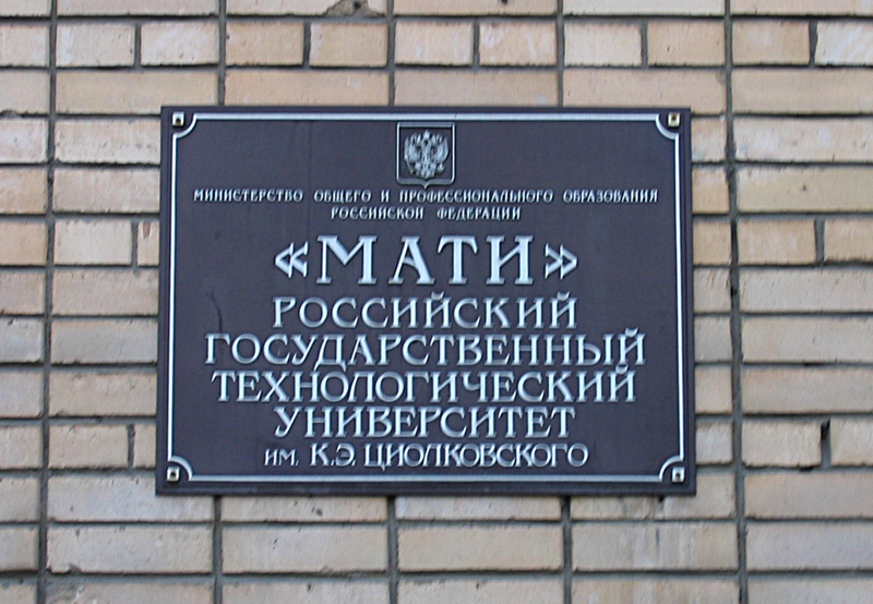 Табличка с названием университета у главного входа в здание на Берниковской набережной.